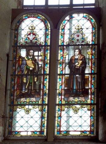 Klosterkirche Grimma: Buntglasfenster mit den Bildnissen von Martin Luther und Philipp Melanchton - Foto: Holger Zürch